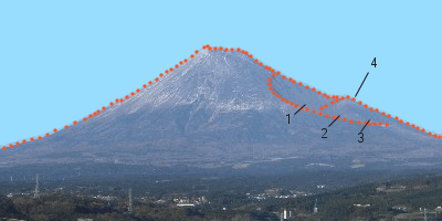 富士山(Mount Fuji)の宝永火口と宝永山の説明図